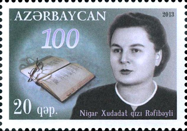 N 1088 - 20 qapik. The stamp dedicated to the 150th Ann. of the outstanding Azerbaijan poetess Nigar Rafibeyli.